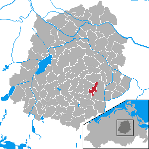 Pripsleben, Landkreis Demmin, Mecklenburg-Vorpommern